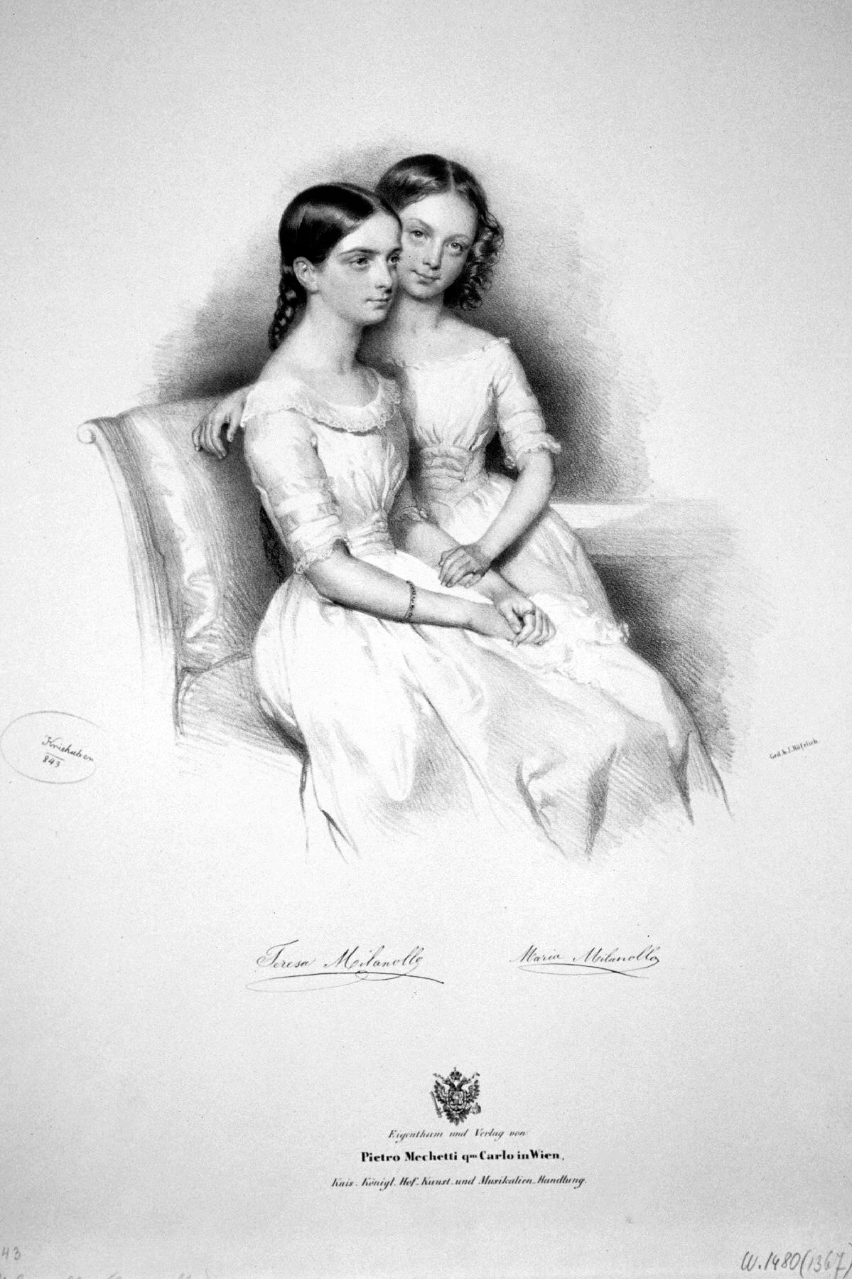 Teresa Milanollo (1827-1904) und Maria Milanollo (1832-1848) italienische Geigenvirtuosinen. Lithographie von Josef Kriehuber, 1843